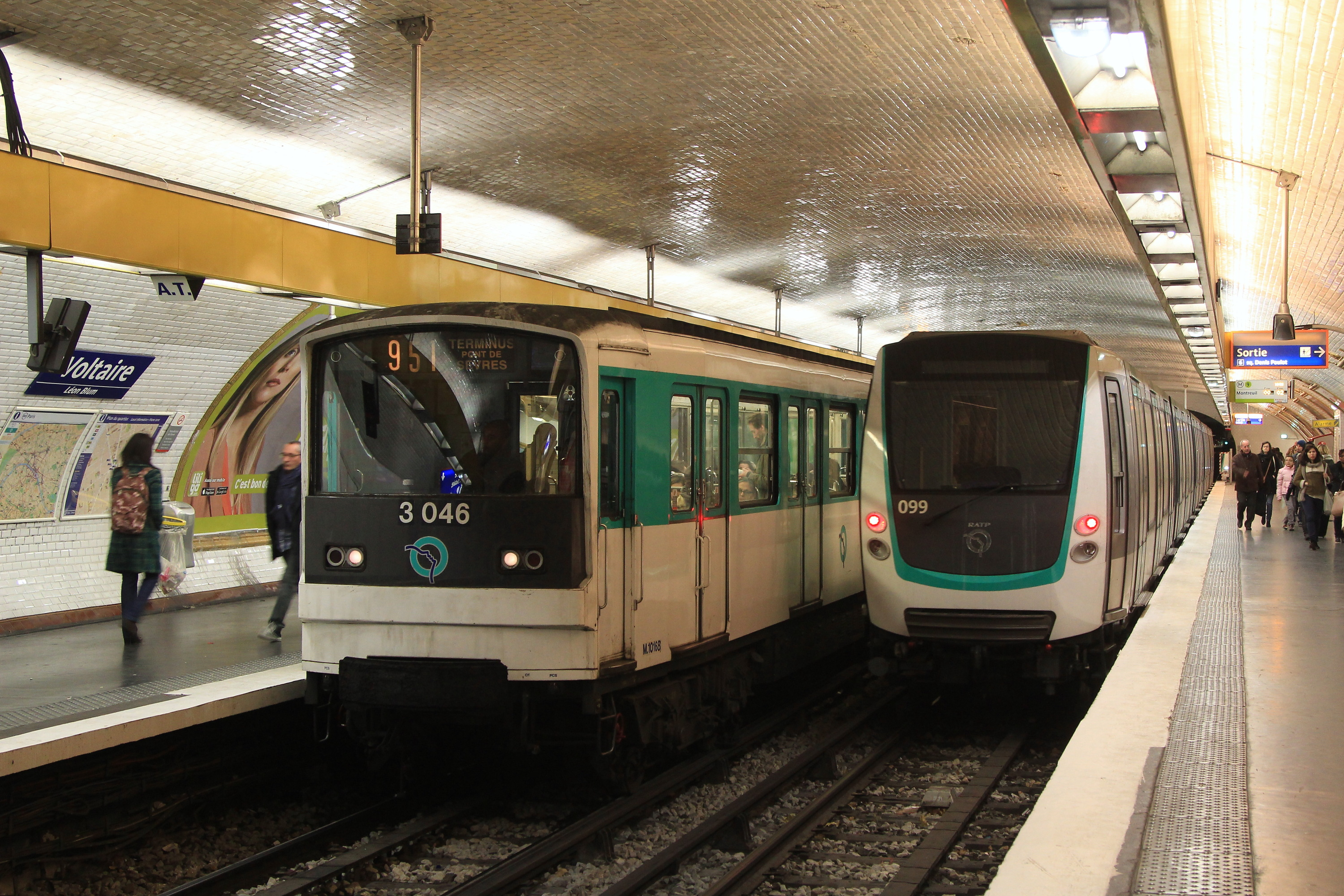 Croisement à la station Voltaire du métro parisien d'une rame MF 67 et d'une autre MF 01.